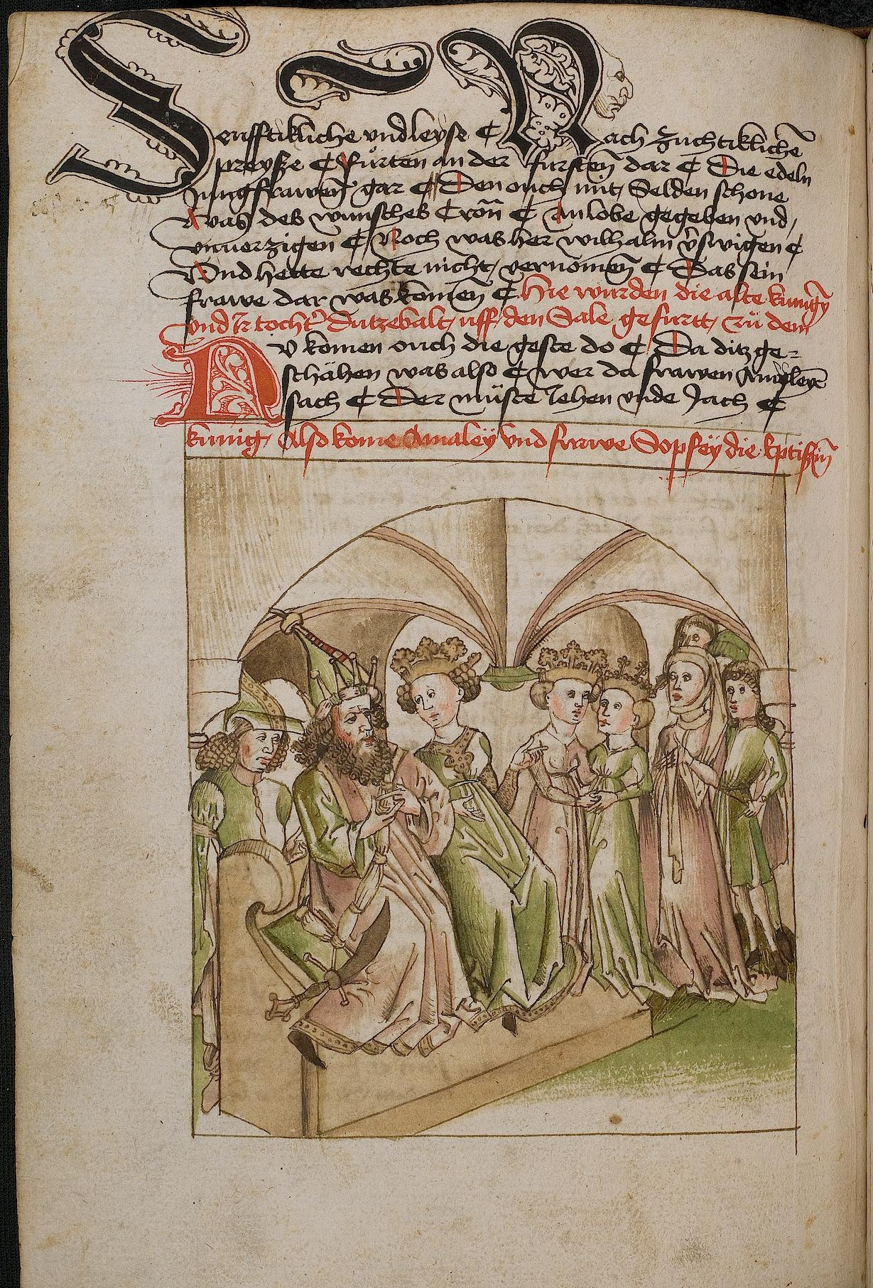 Codex Palatinus germanicus 4, Blatt 167v der Handschrift: "Rudolf von Ems, Willehalm von Orlens", Illustration, Bildüberschrift: Ameley und Frau Sopfey, die Äbtissin, vor dem König.